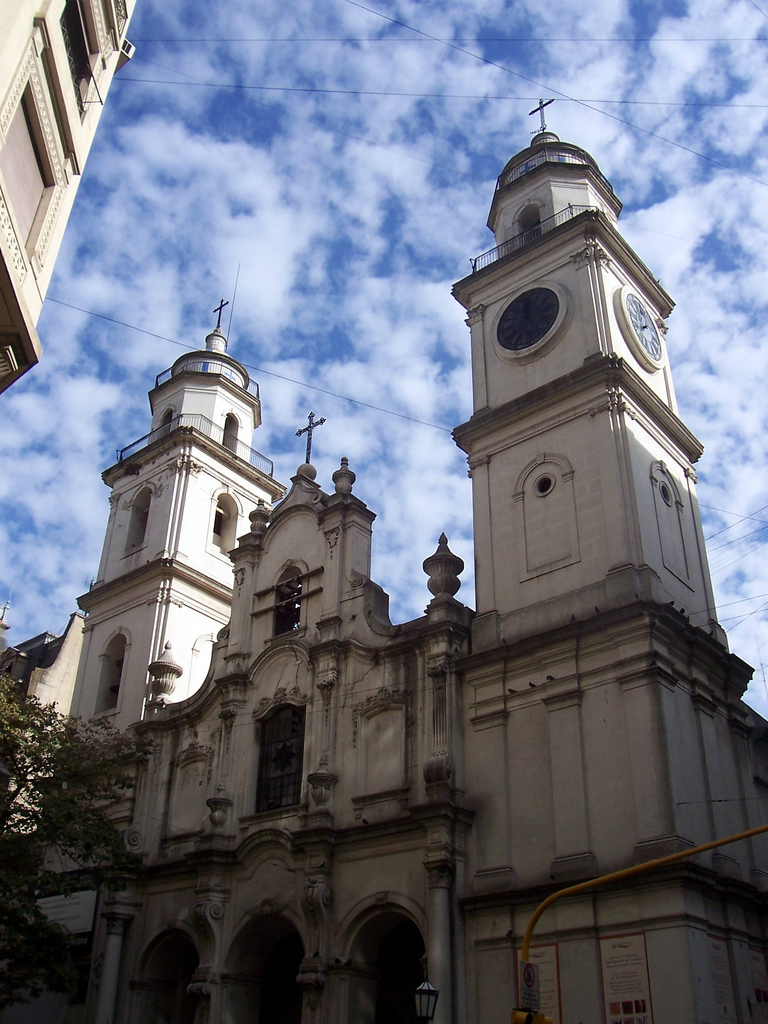 Parish of San Ignacio de Loyola (1722). Buenos Aires.